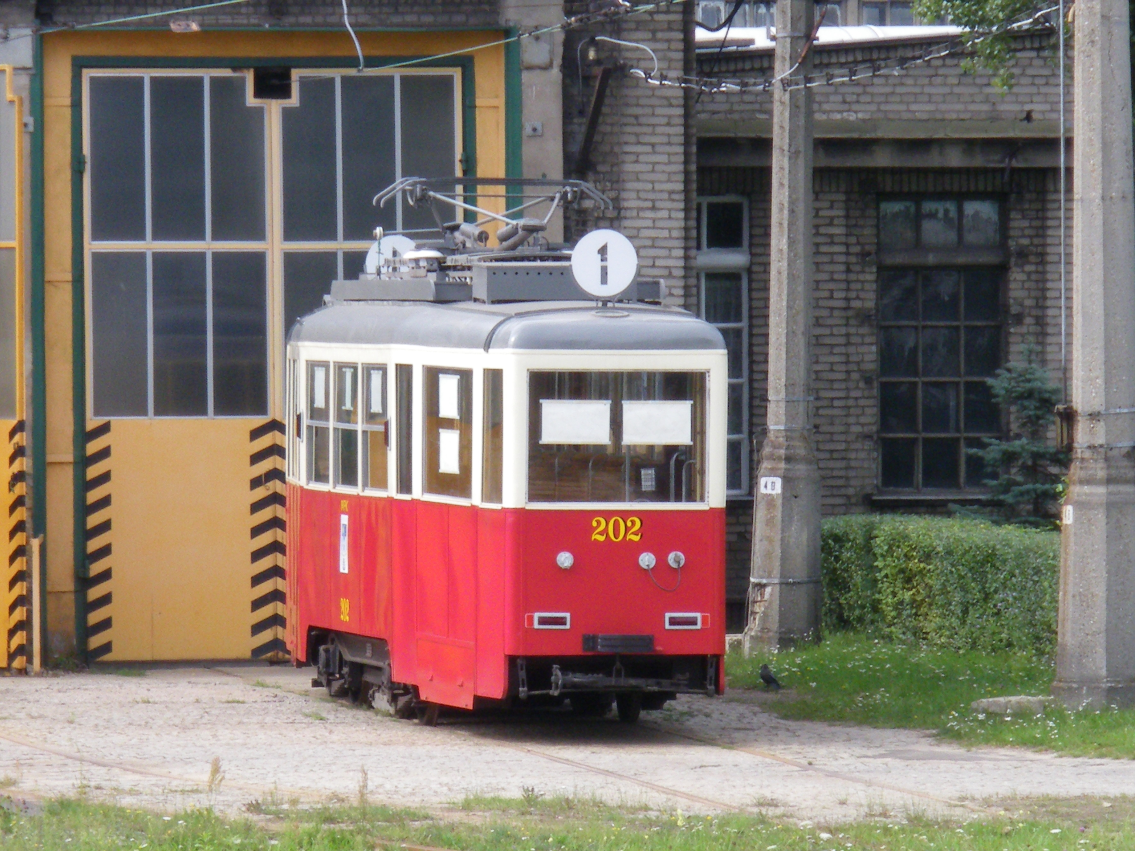 Zabytkowy tramwaj Konstal 4N1 (#202) z 1958 roku w zajezdni MPK Częstochowa.